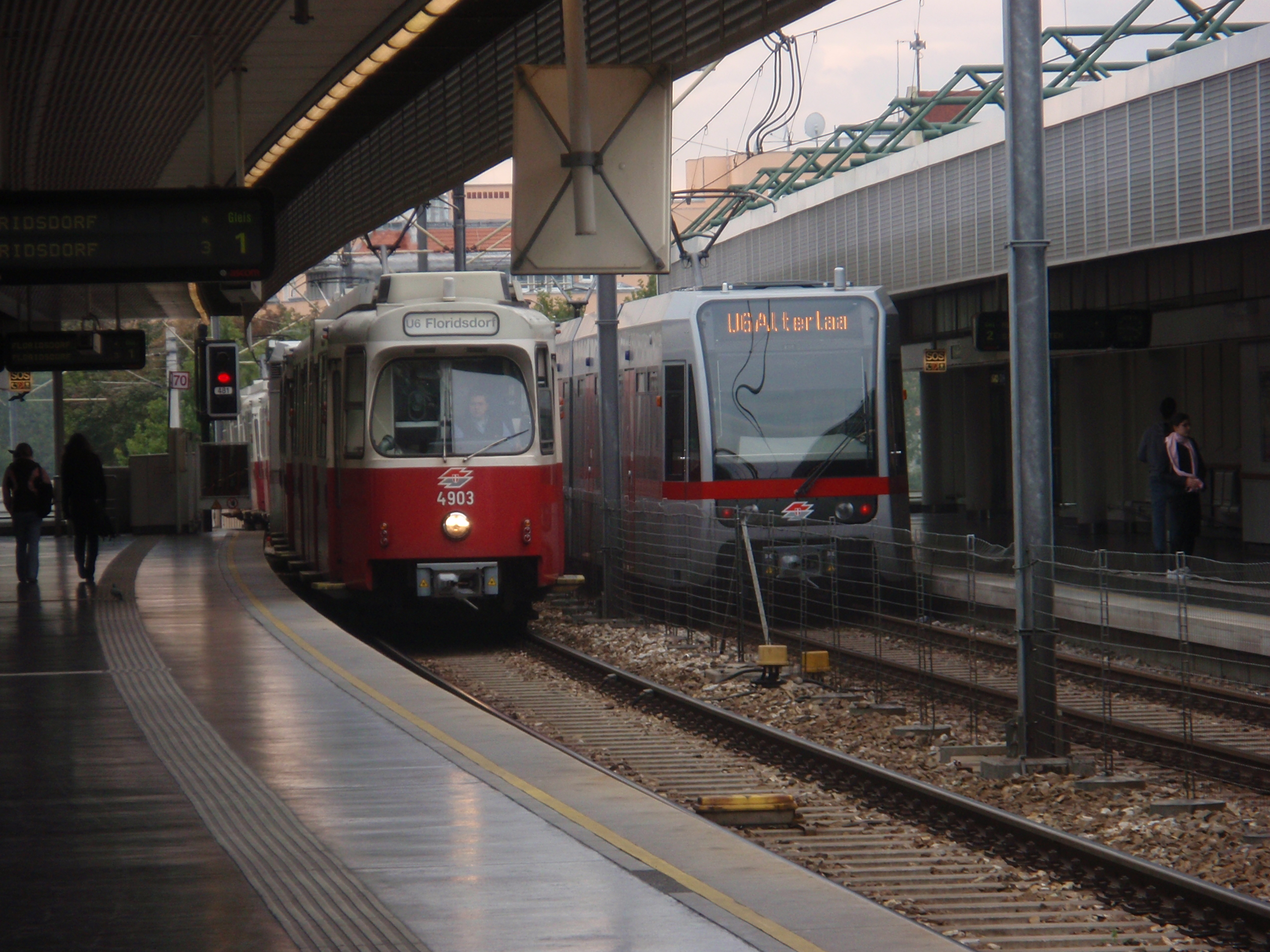 U6-Station Handelskai